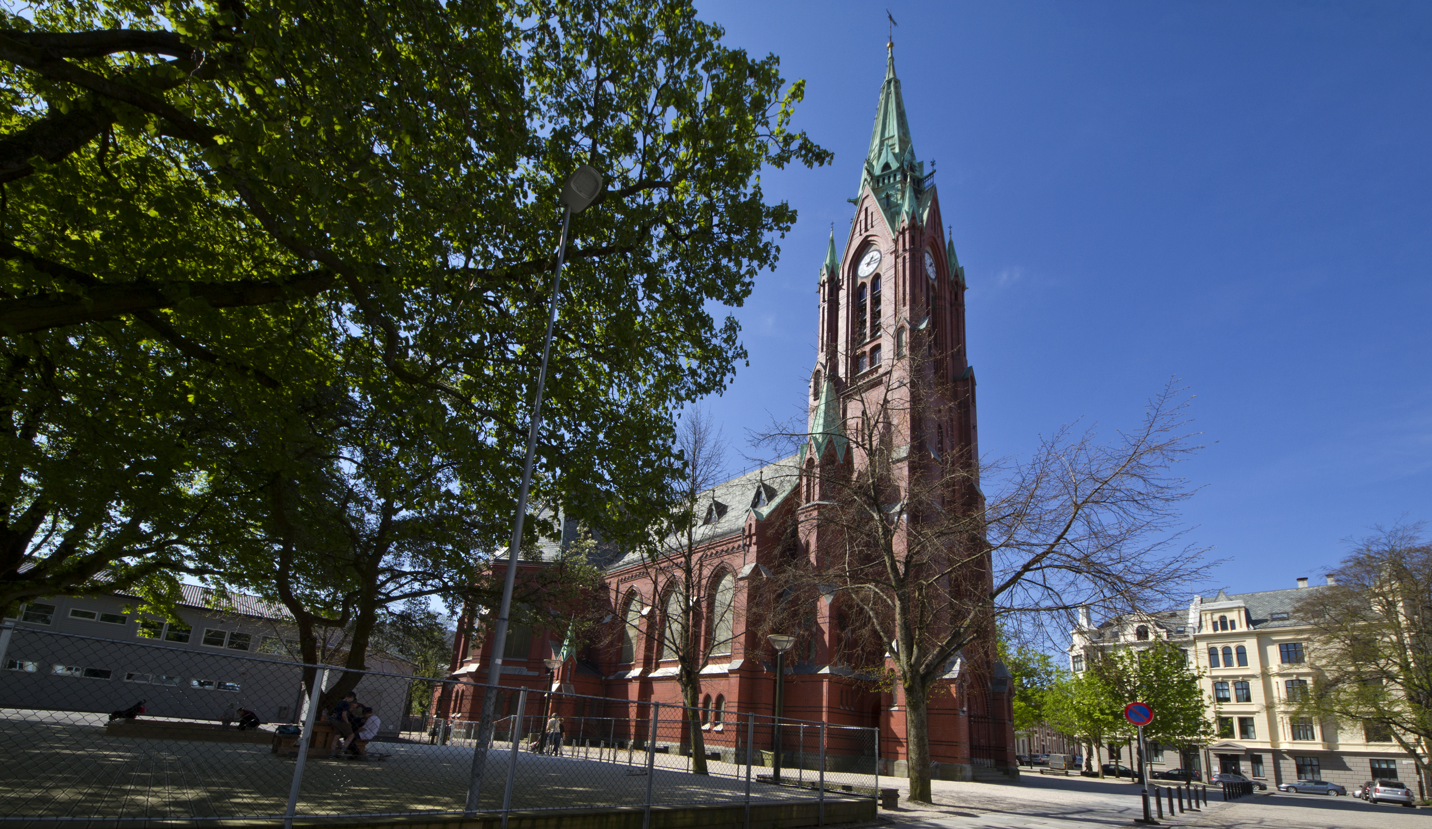 Johanneskirken, Sydnes, Bergen, Hordaland, Norway